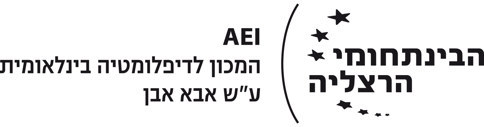 לוגו חדש של מכון אבא אבן